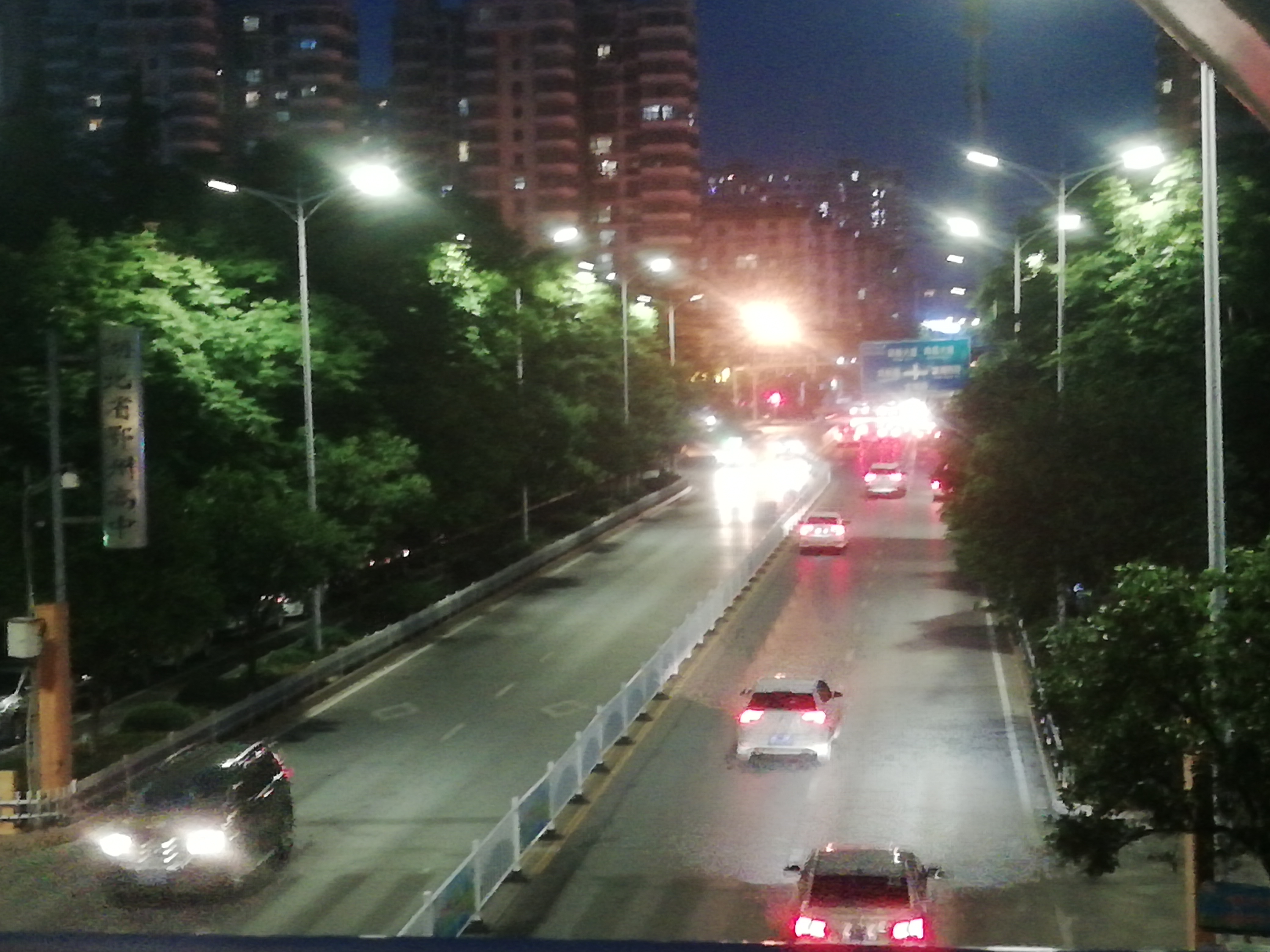 中文（中国大陆）: 鄂州市鄂城区古城路的夜晚